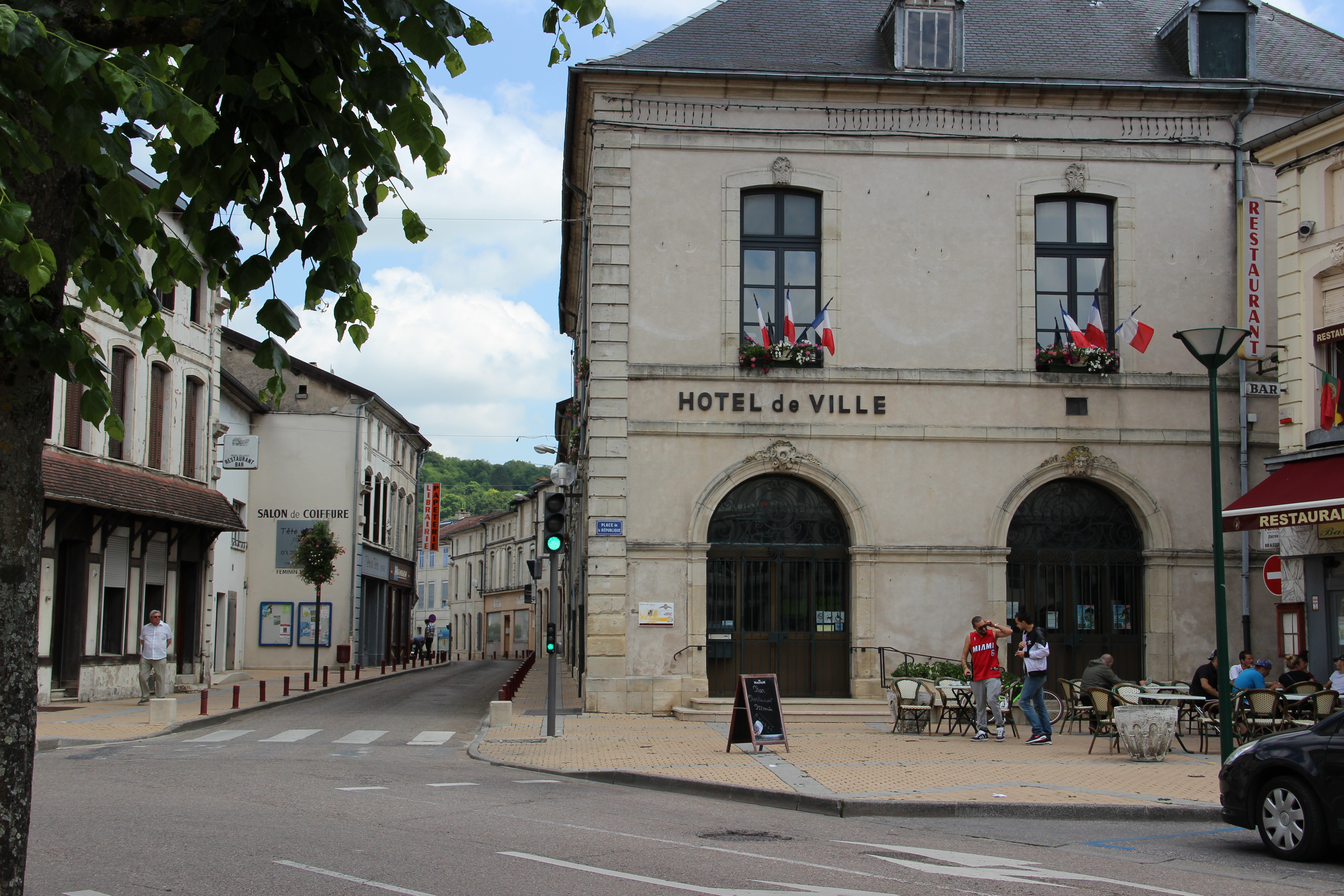 La mairie et la rue de Strasbourg